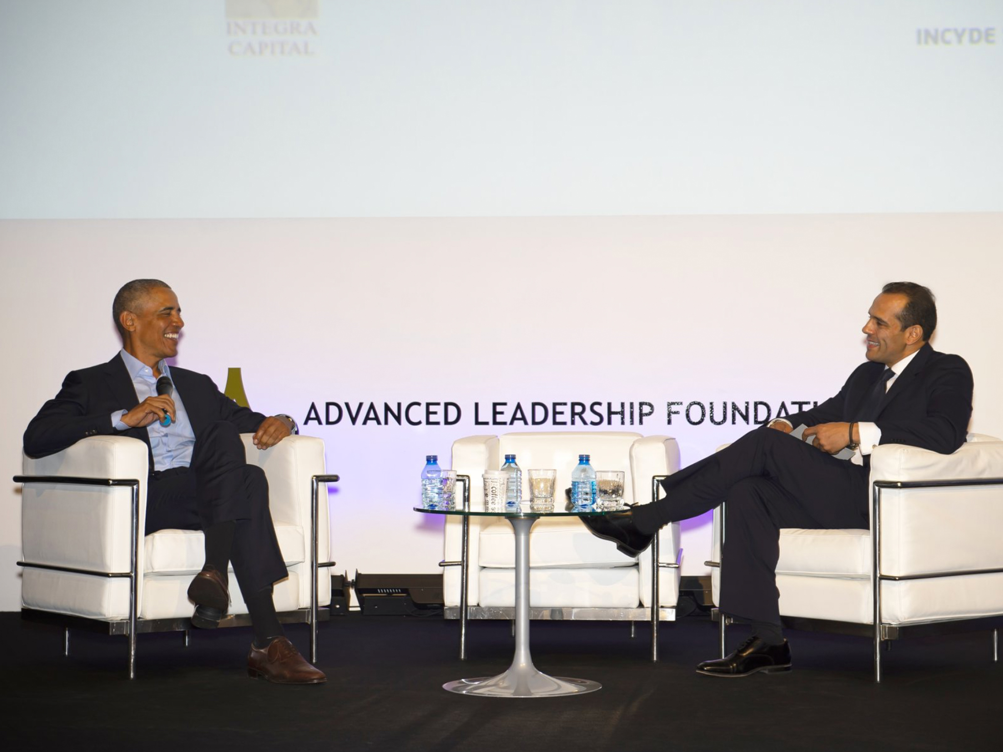 Barack Obama y Juan Verde en Madrid